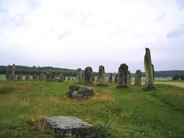 Skeppsättningen i Blomsholm, Strömstads kommun, Bohuslän. Fotograferad 22/7 2004 av Tubaist.